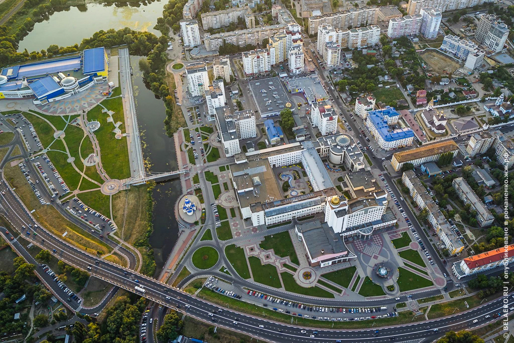 Вид Белгород с аэростата «Белгород». 5 августа 2014